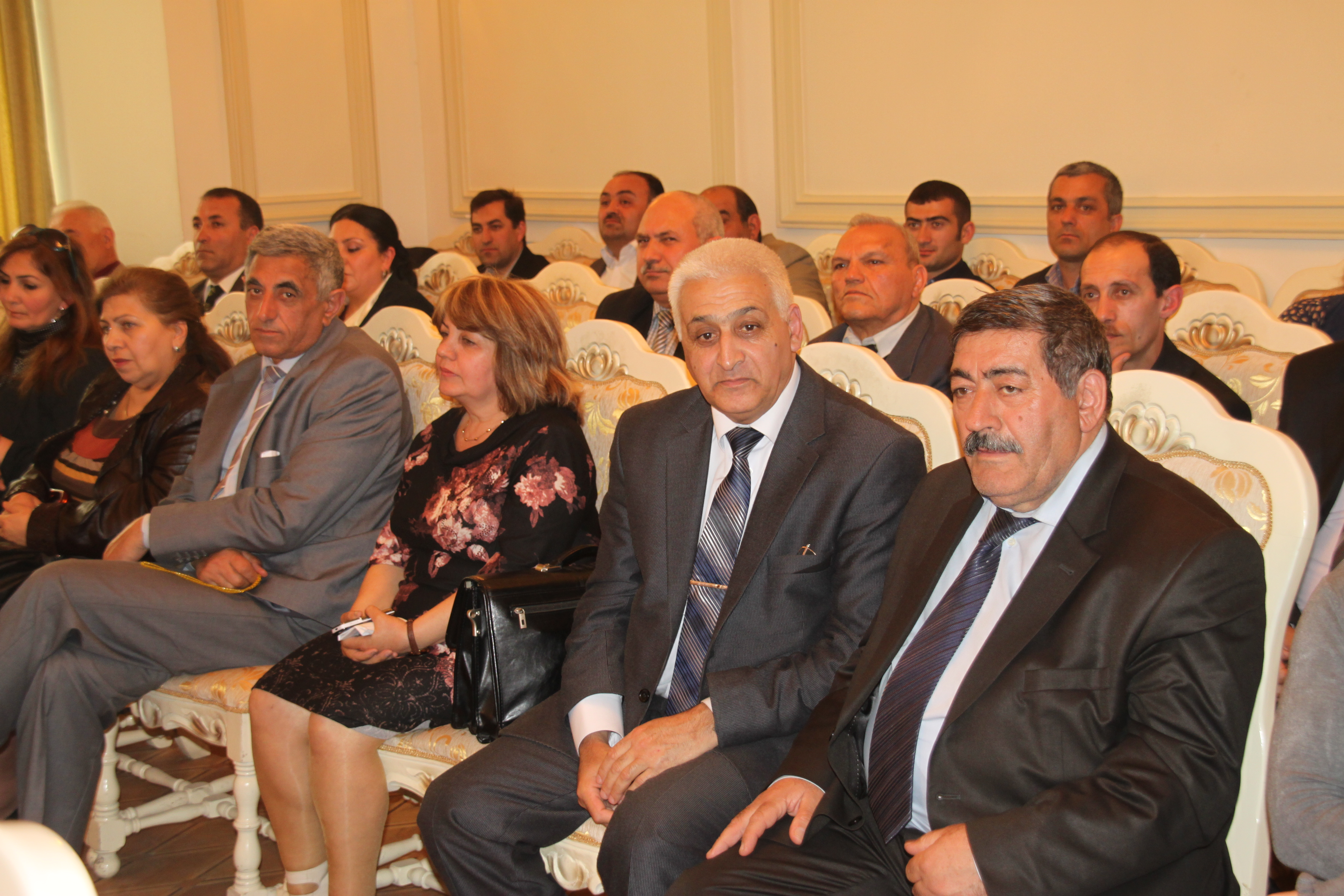 Jurnalist Saşa Əliyev və professor İsmayıl Məmmədli